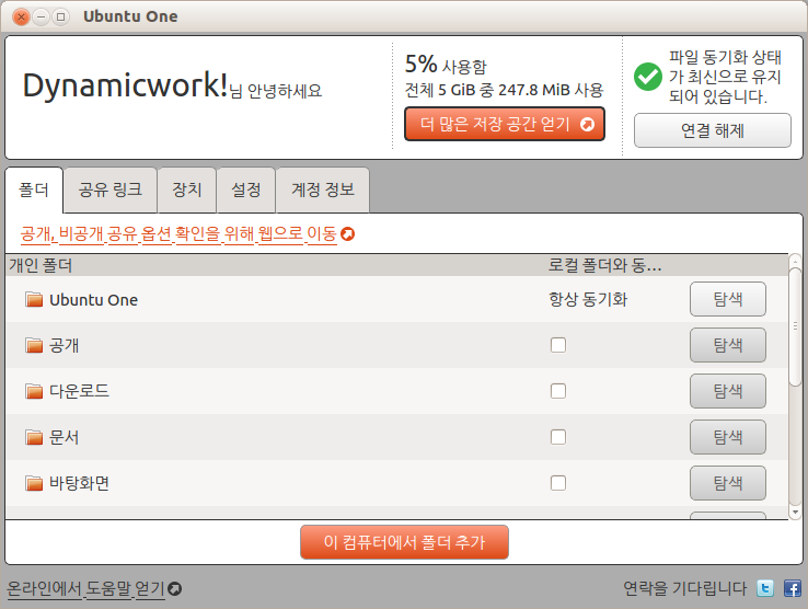 우분투 13.04에서의 우분투 원 클라이언트